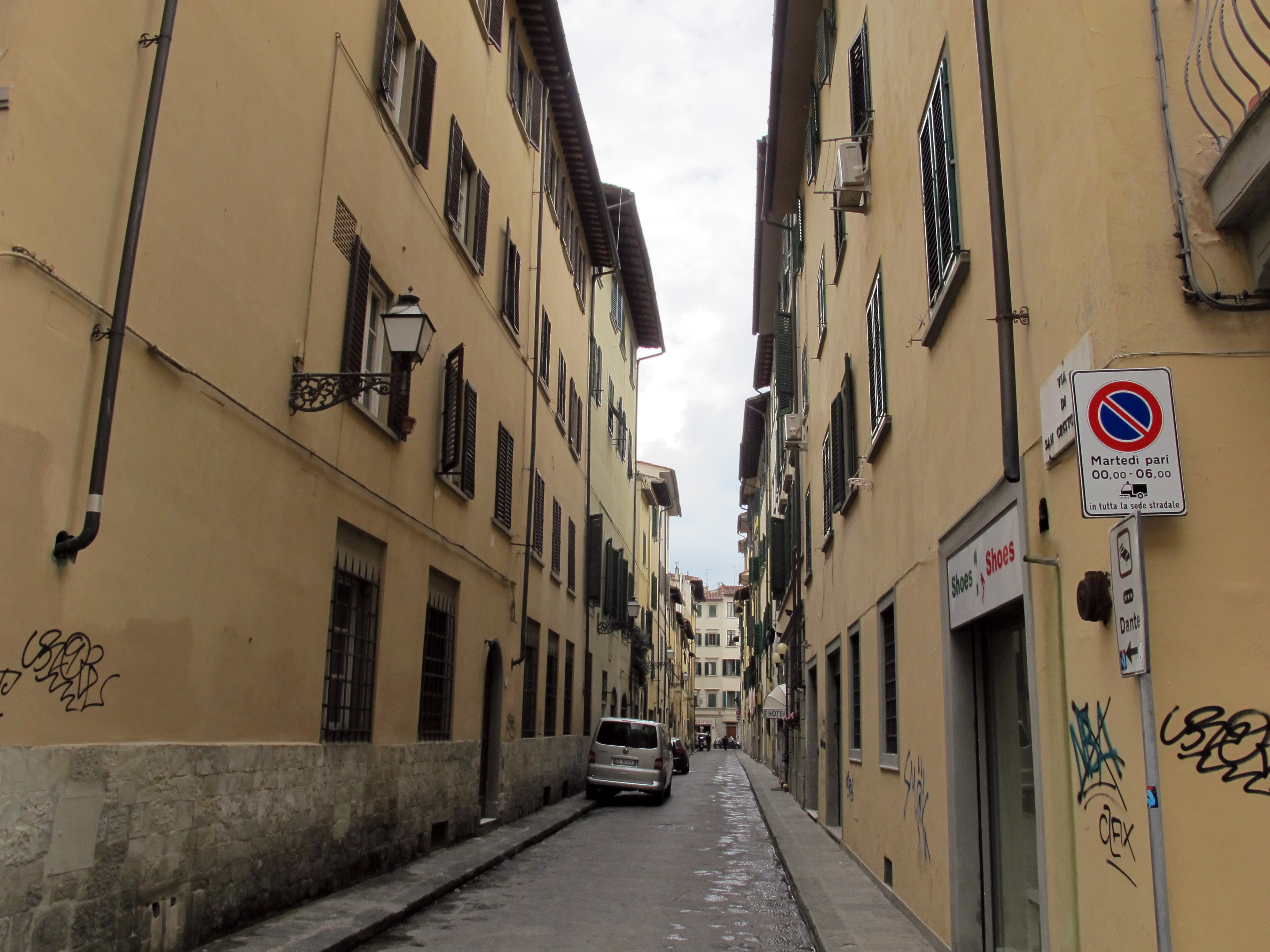 Via san cristoforo, veduta